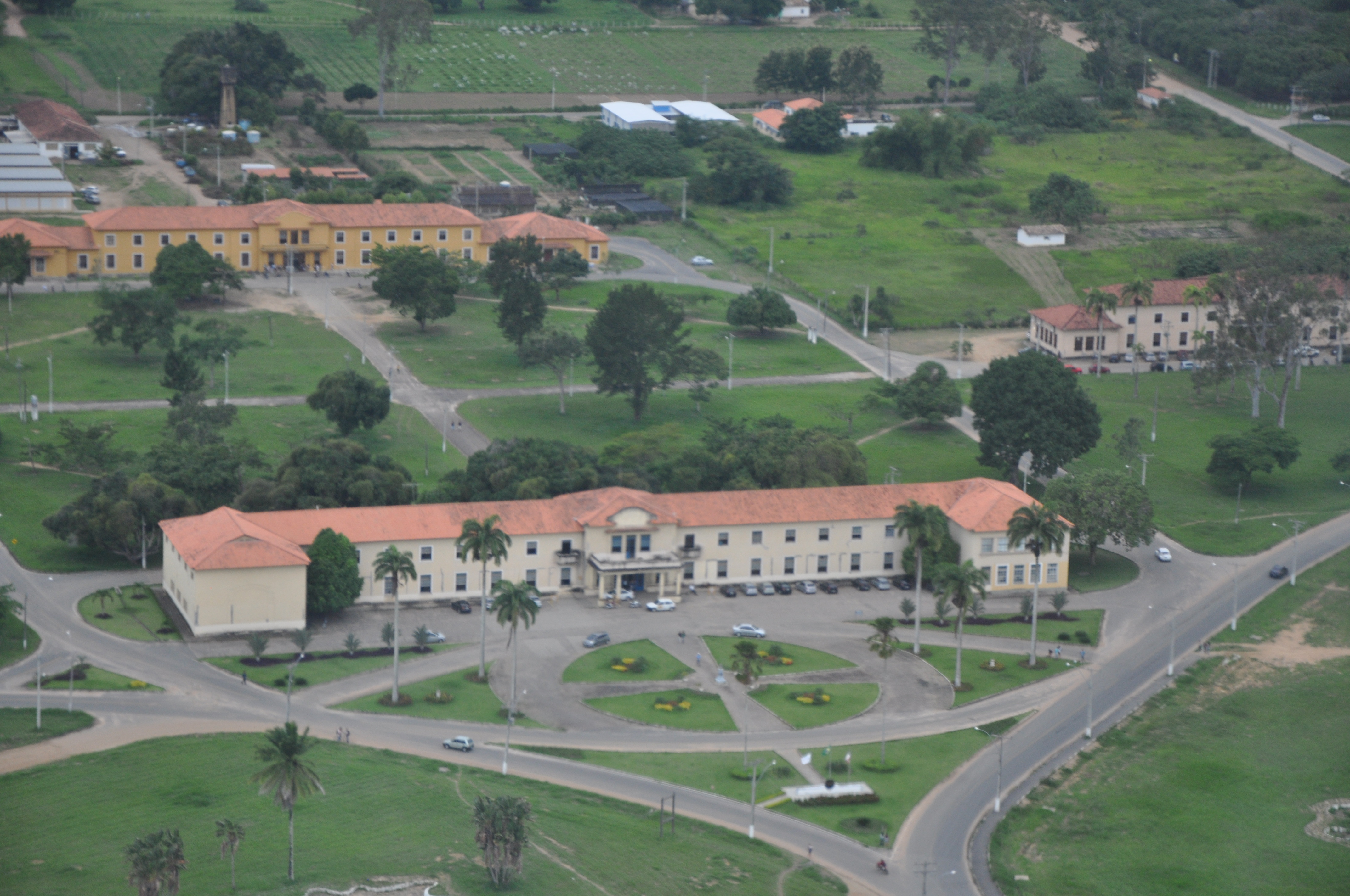 Vista aérea do Campus da UFRB - Cruz das Almas